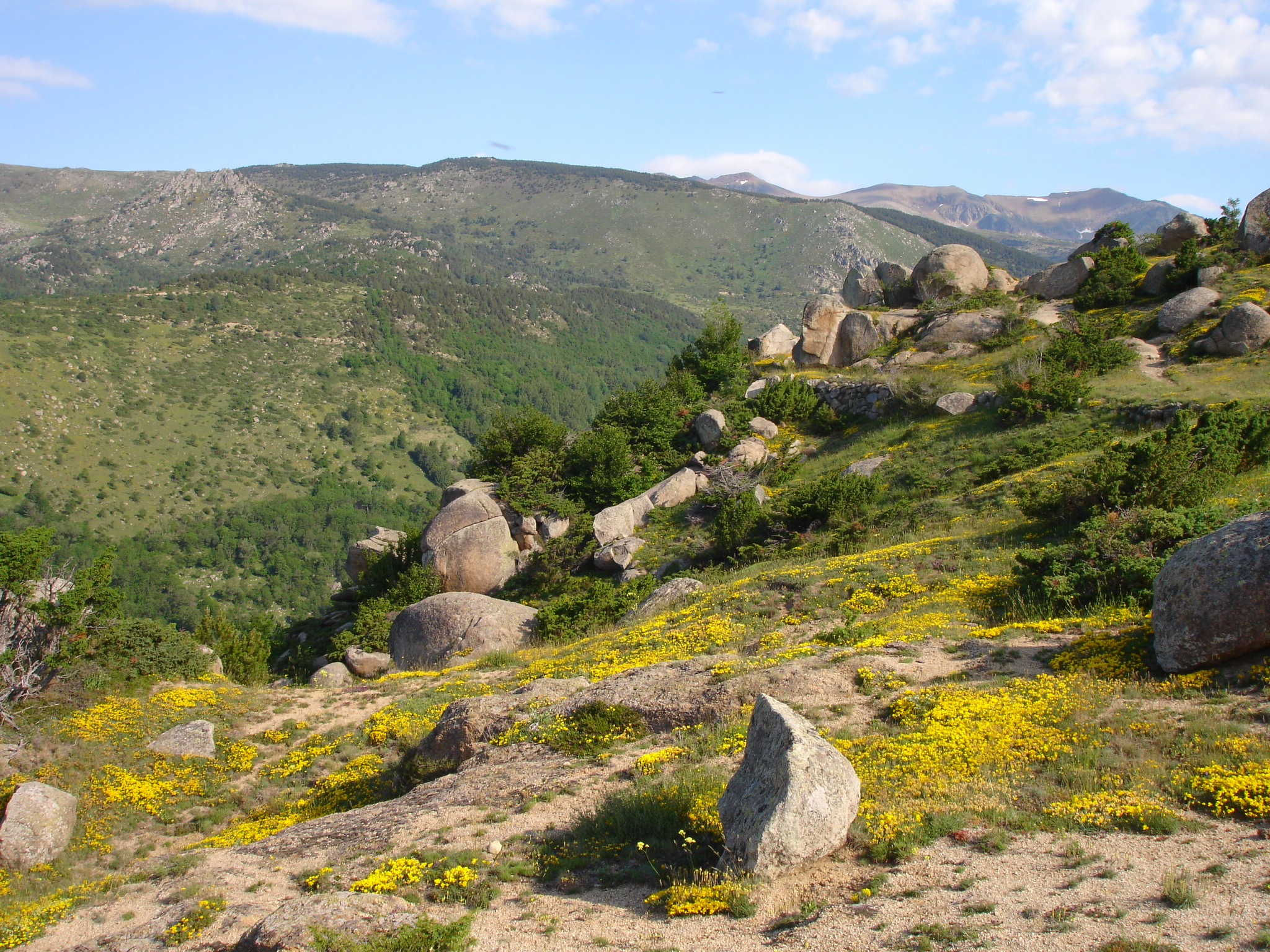 France, Pyrénées-Orientales (66), chaos de Targassonne près de Font-Romeu-Odeillo-Via - chaos granitique